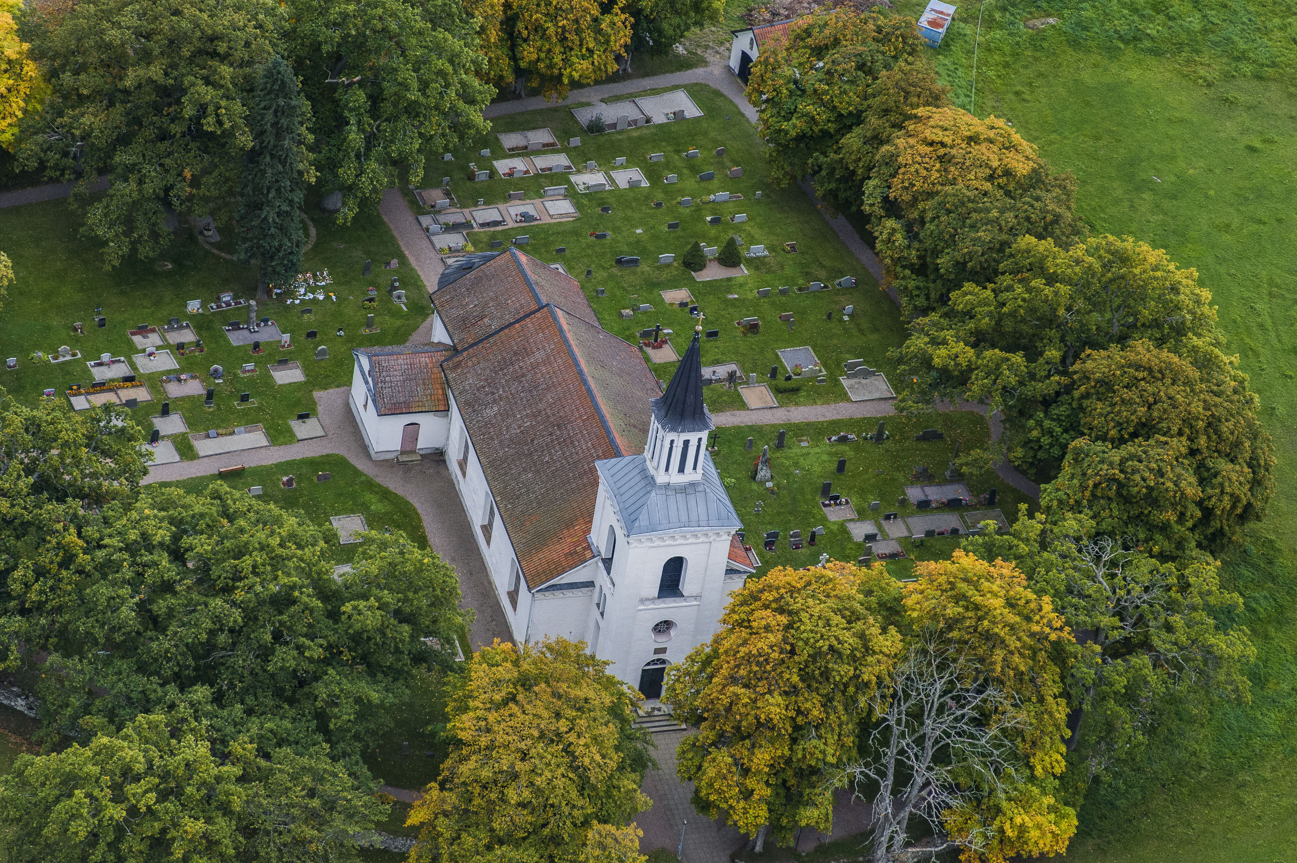 Förkärla kyrka flygfoto